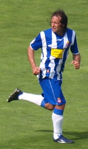 Rufete en el partido que enfrentó al RCD Español y al Málaga CF en el último partido de La Liga 2008/09 en el estadio Olímpico de Montjuic.